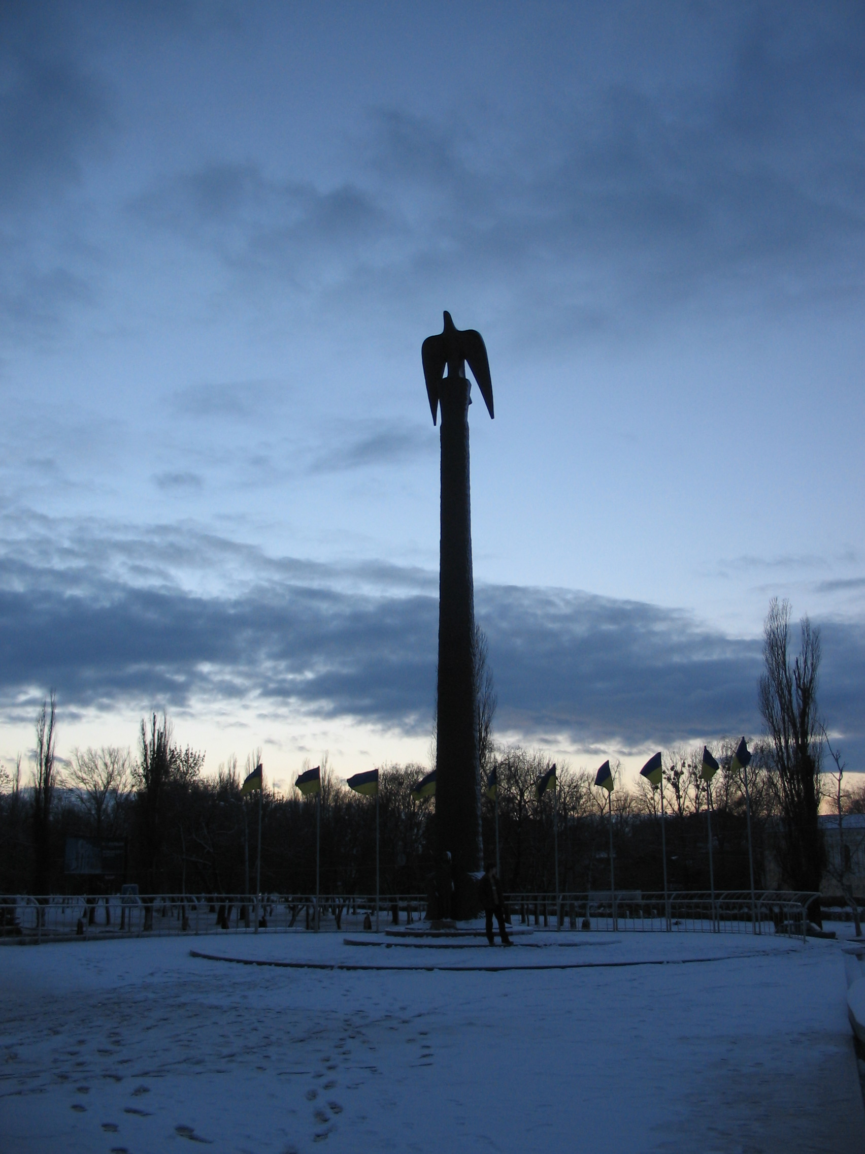 Монумент на честь 10-річчя Незалежності України 1991 – 2001 рр. Арх. Ю. Спасов, ск. О.І. Рідний